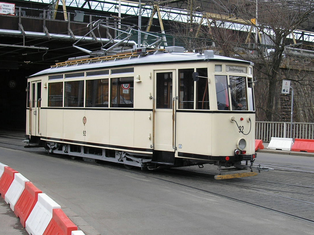 Historischer Straßenbahntriebwagen vom Typ Gotha T2, Baujahr 1938 der Erfurter Verkehrsbetriebe AG in der Bahnhofstraße (Erfurt)